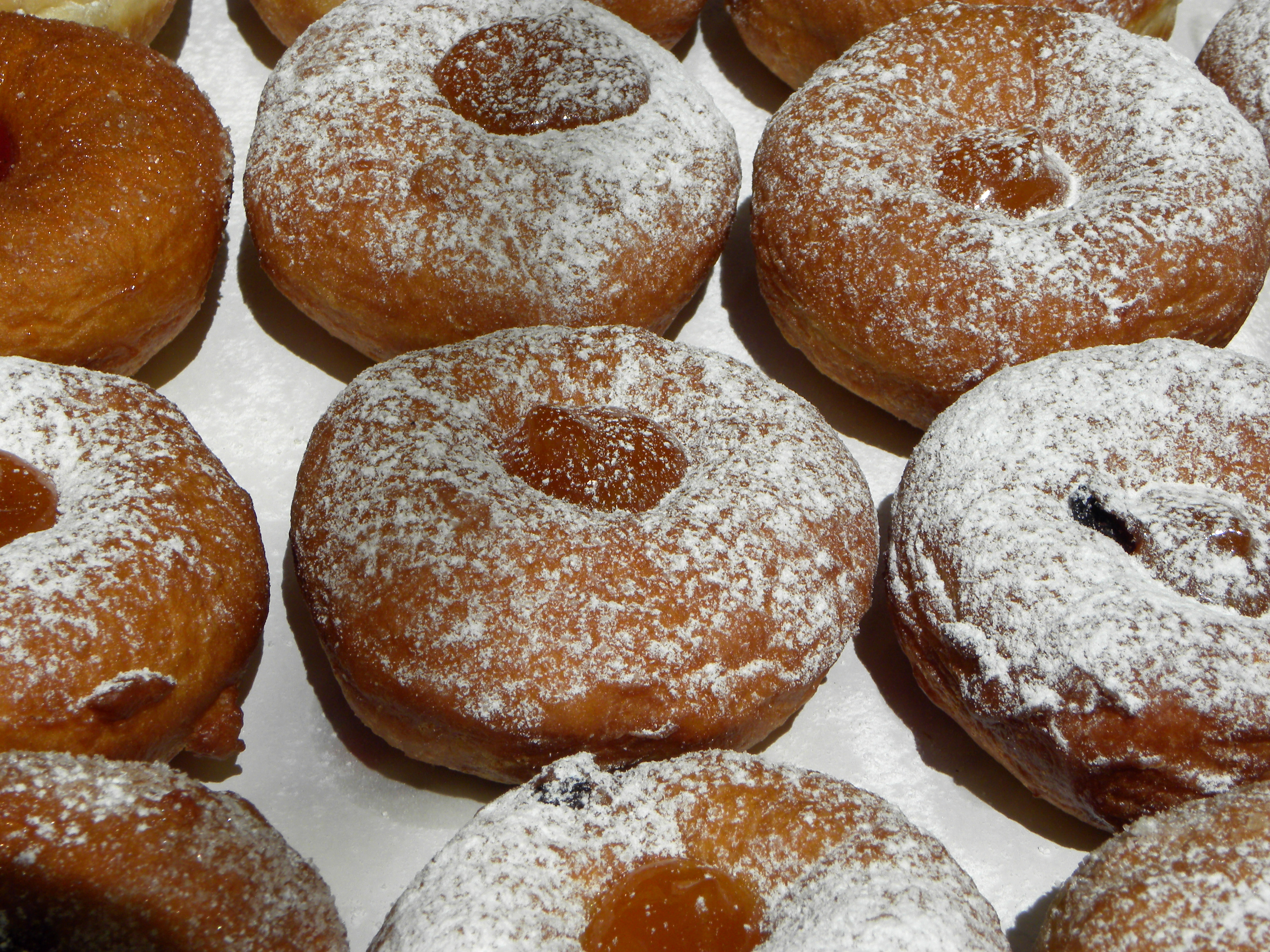 Bayerische Kücherl bzw. Bauernkrapfen beim Mönichwalder Krapfenkirtag.